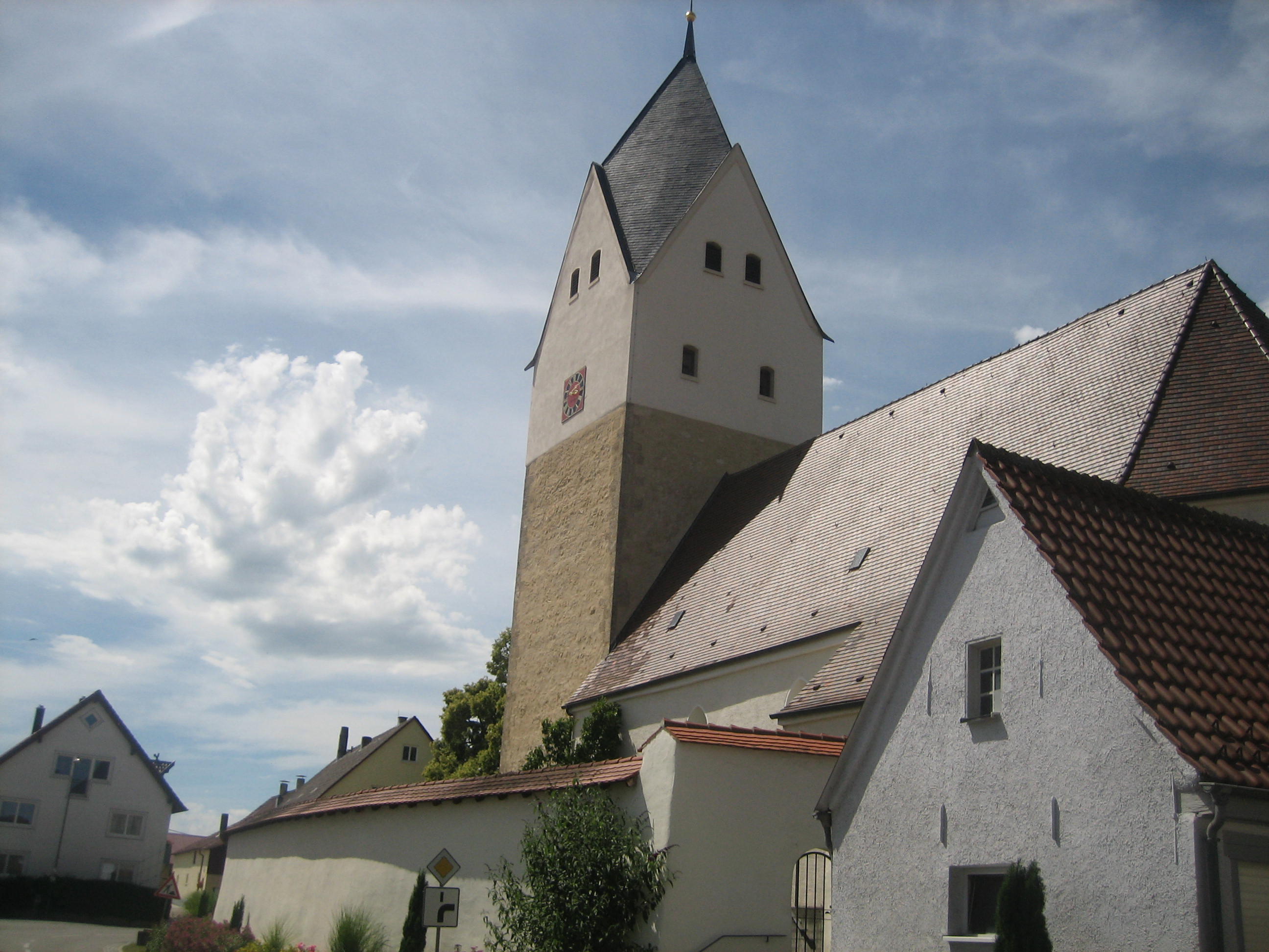 St.-Barbara-Kirche Holzkirch (Landkreis Ulm)